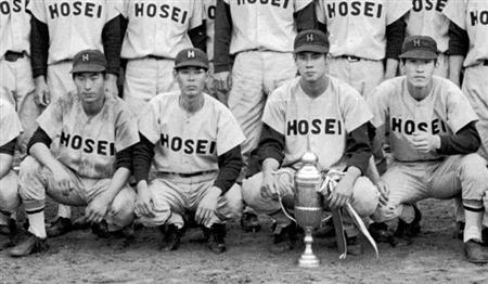 1968年